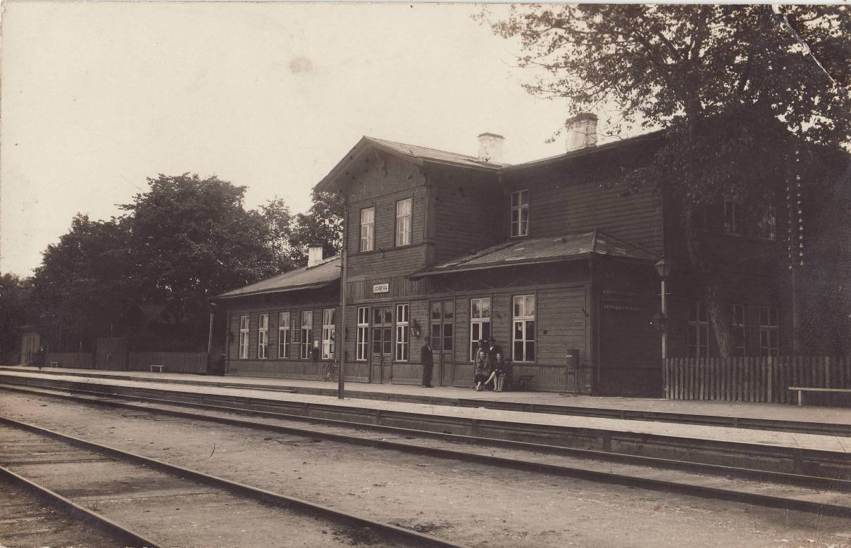 Jõgeva raudteejaam ja vana jaamahoone enne II maailmasõda. This image on crowdsourcing geotagging platform Ajapaik